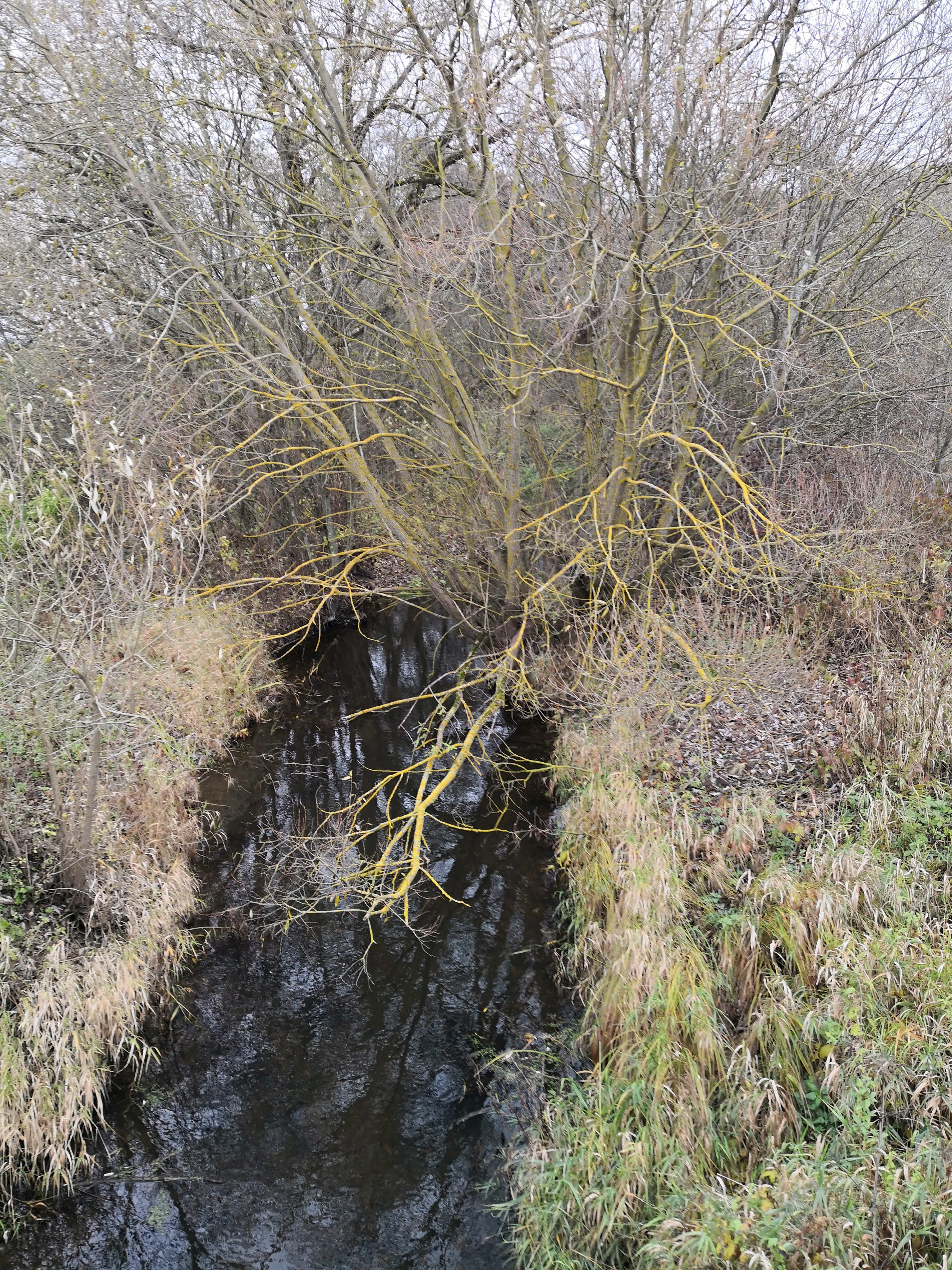 Antvardė ties Girdžiais, žvelgiant nuo tilto į rytų pusę. G. Kulikausko fotografija, 2018 m. spalis.